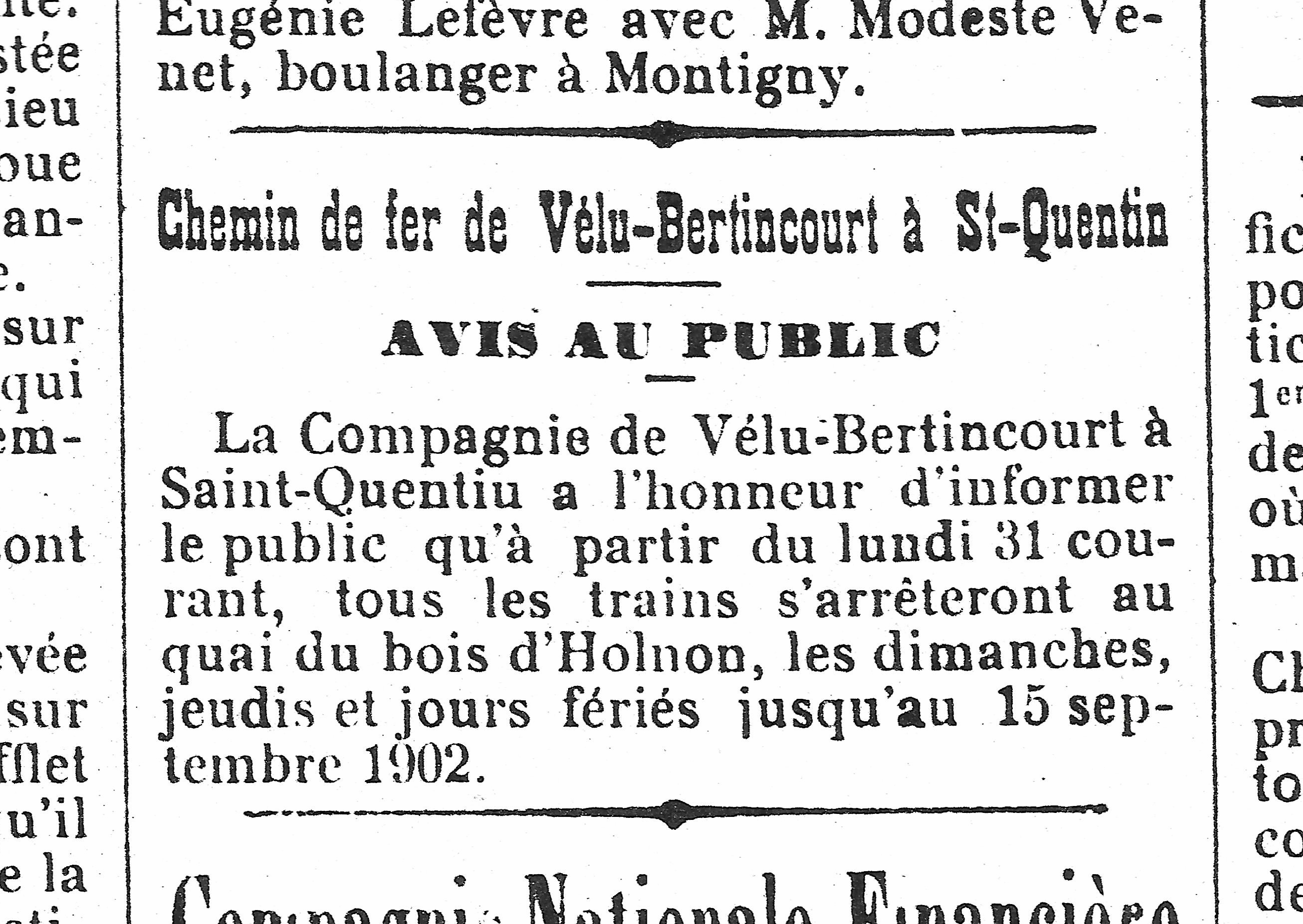 Horaire Bois d'Holnon